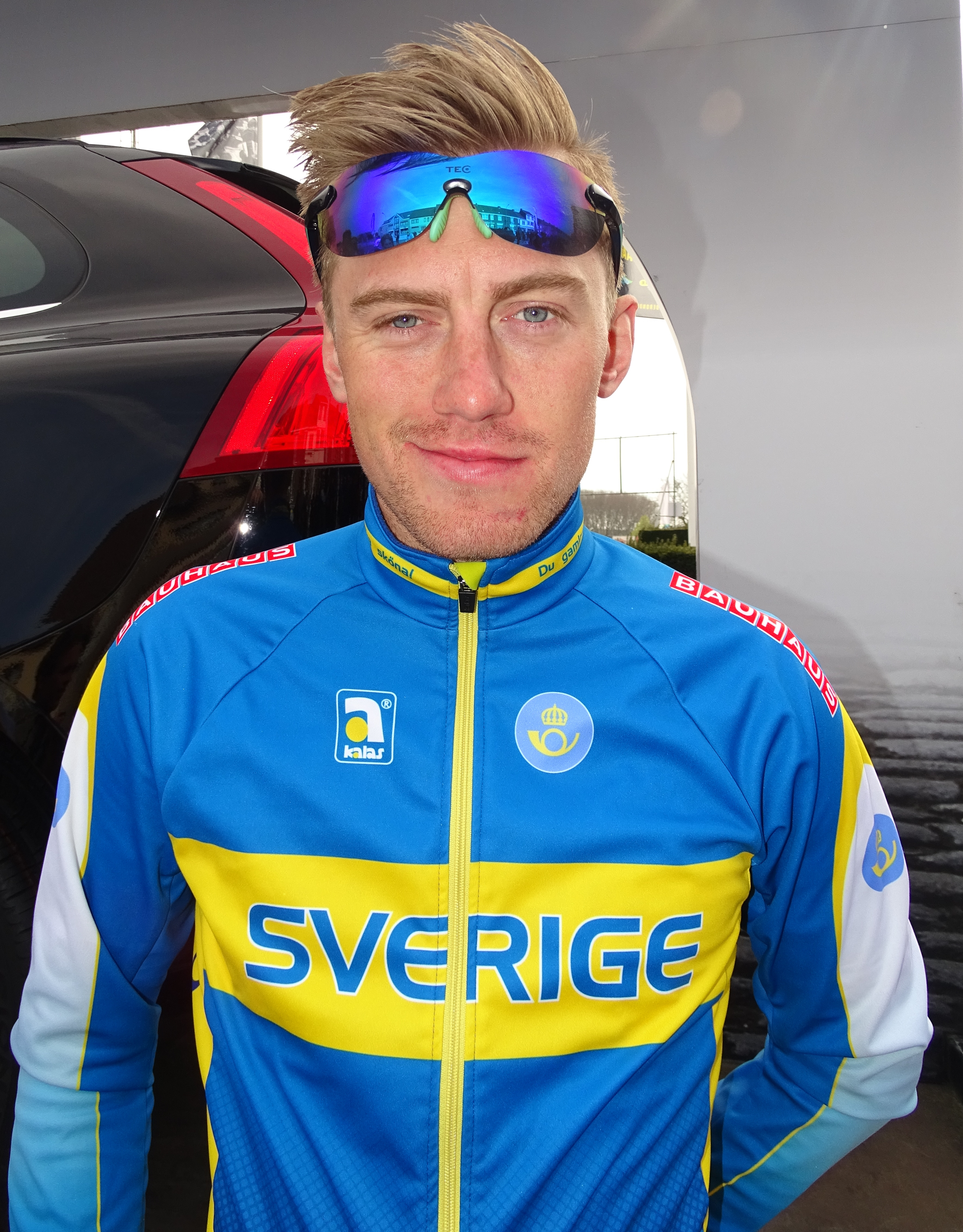 Reportage réalisé le samedi 9 avril à l'occasion du départ et de l'arrivée du Tour des Flandres espoirs 2016 à Audenarde, Belgique.